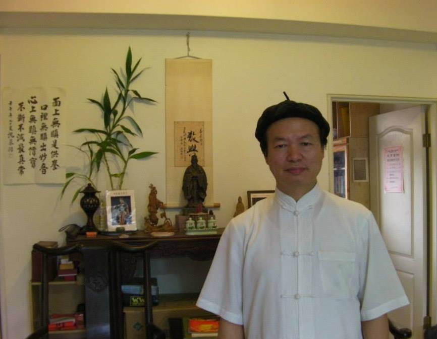 中文（台灣）: 元亨書院攝